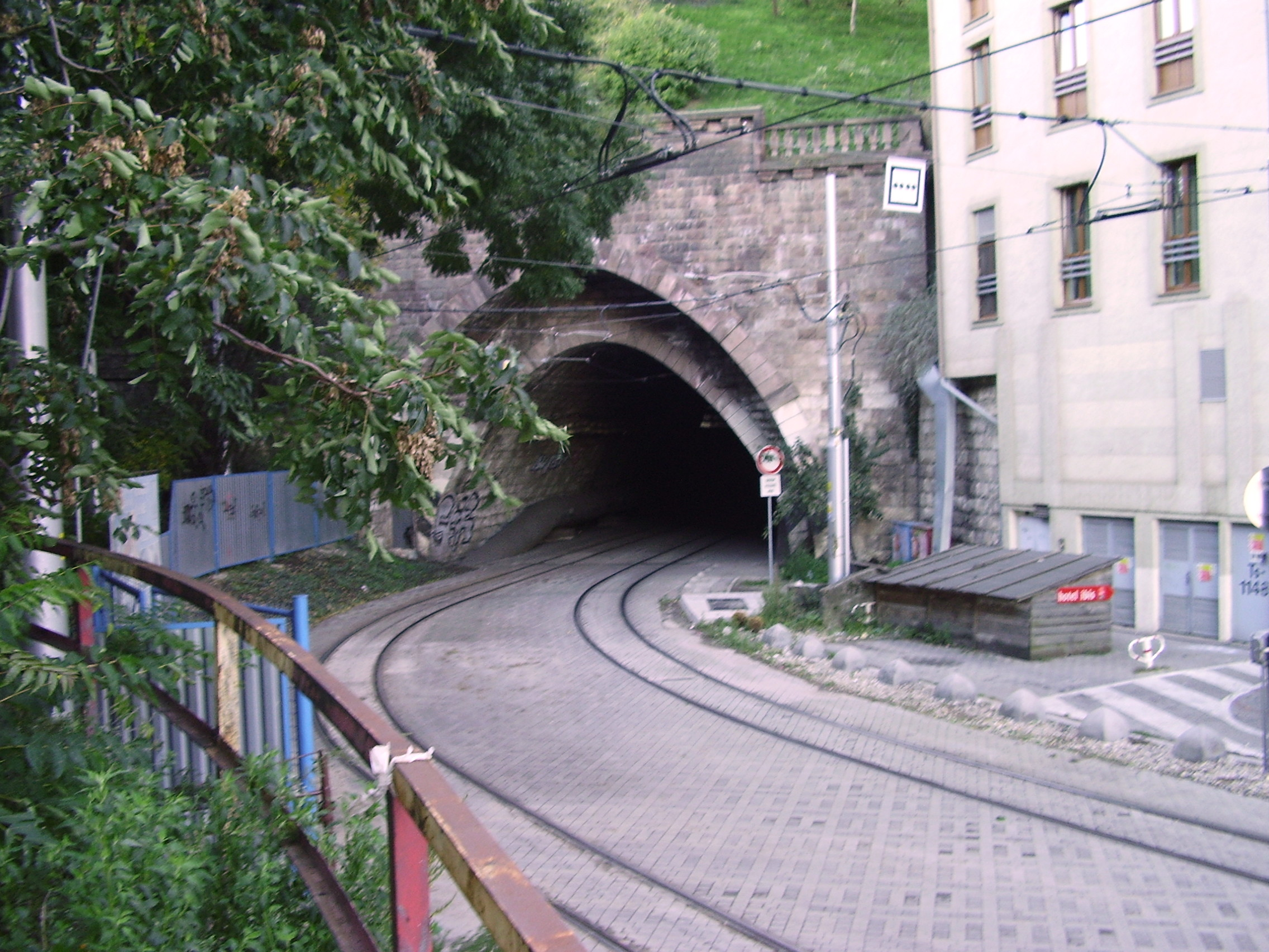 Severní portál bratislavského tramvajového tunelu, který prochází pod hradem